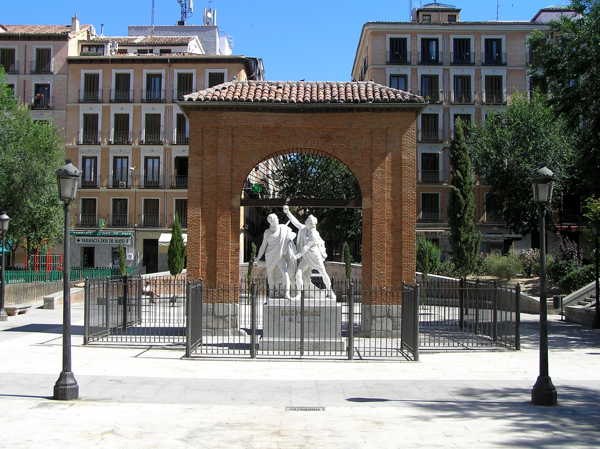 Monumento a Daoiz y Velarde, héroes del 2 de Mayo, erigido en la plaza del mismo nombre (2 de Mayo) de Madrid. La estatua de Velarde ha sido vandalizada.